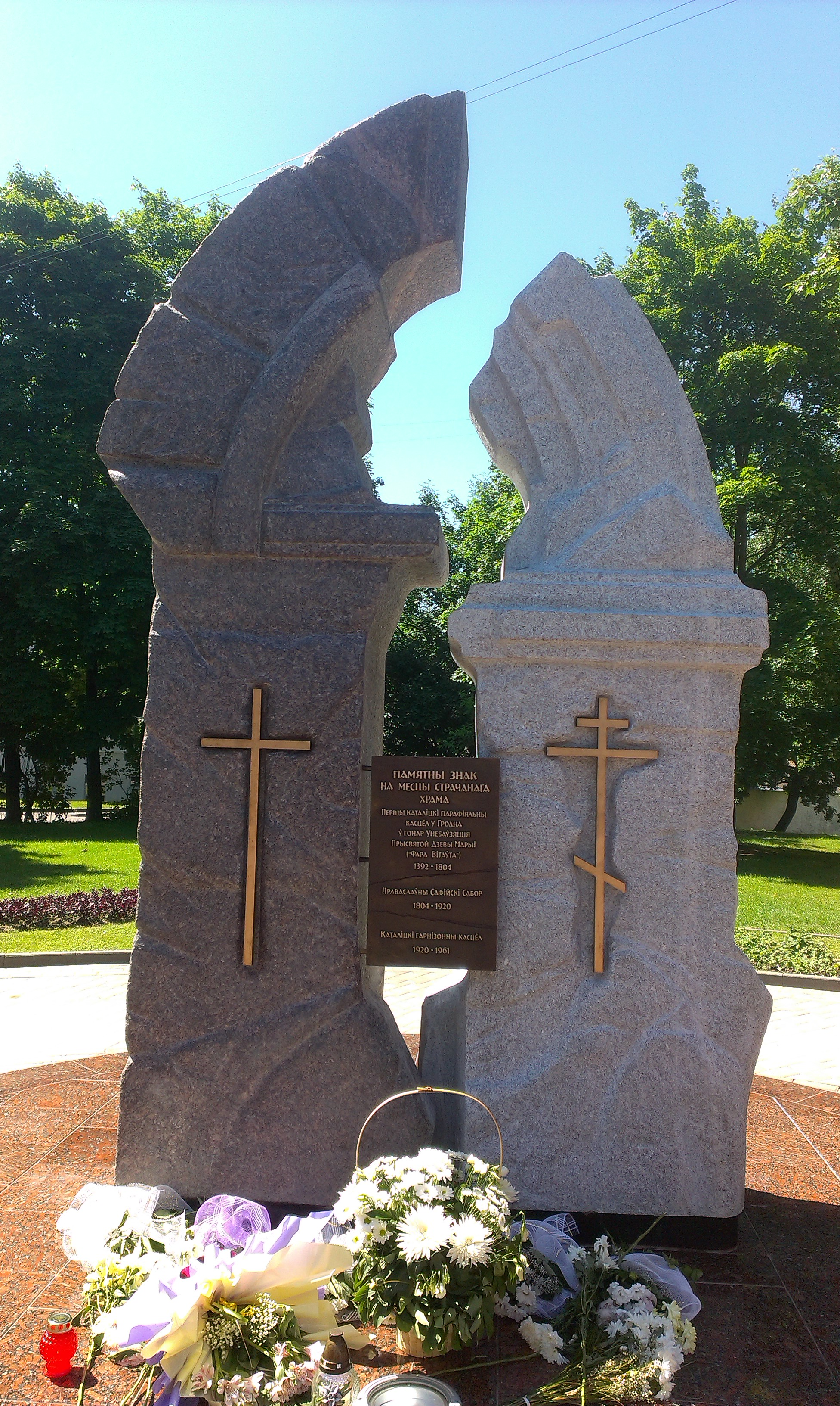 Мемарыяльны знак, адкрыццё якога адбылося ў рамках Х Рэспубліканскага фестывалю нацыянальных культур